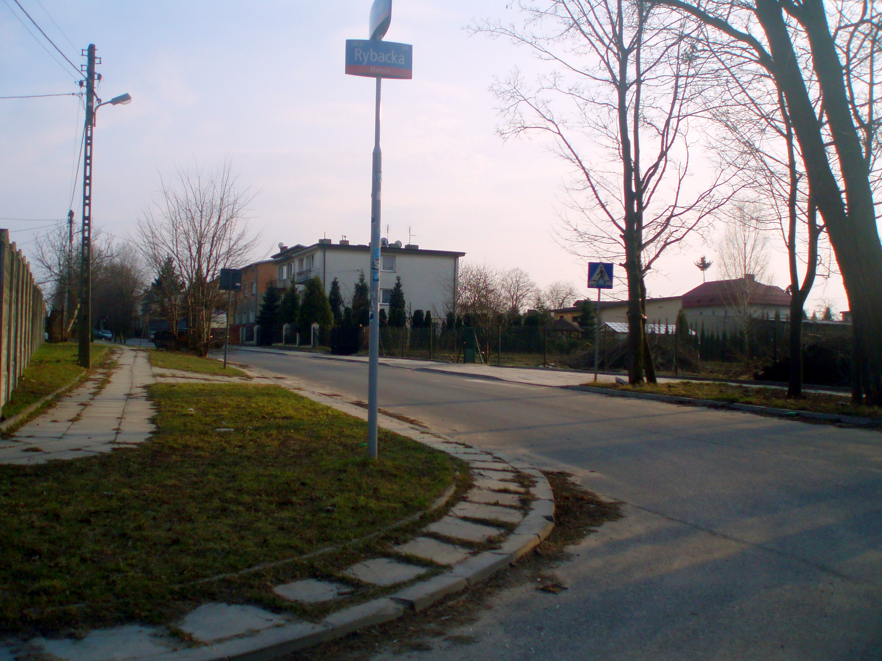 Marysin, Łódź, Poland